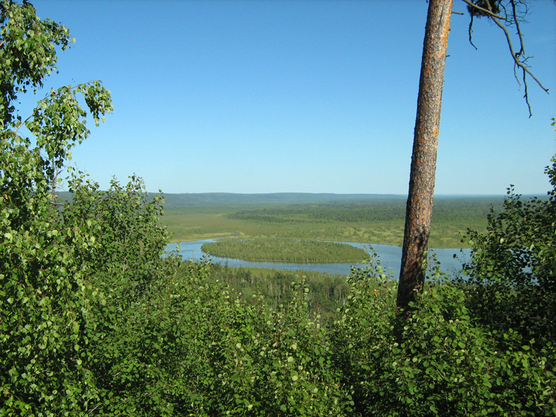 Озеро Плахино (Боровое) Абанский район, Красноярский край